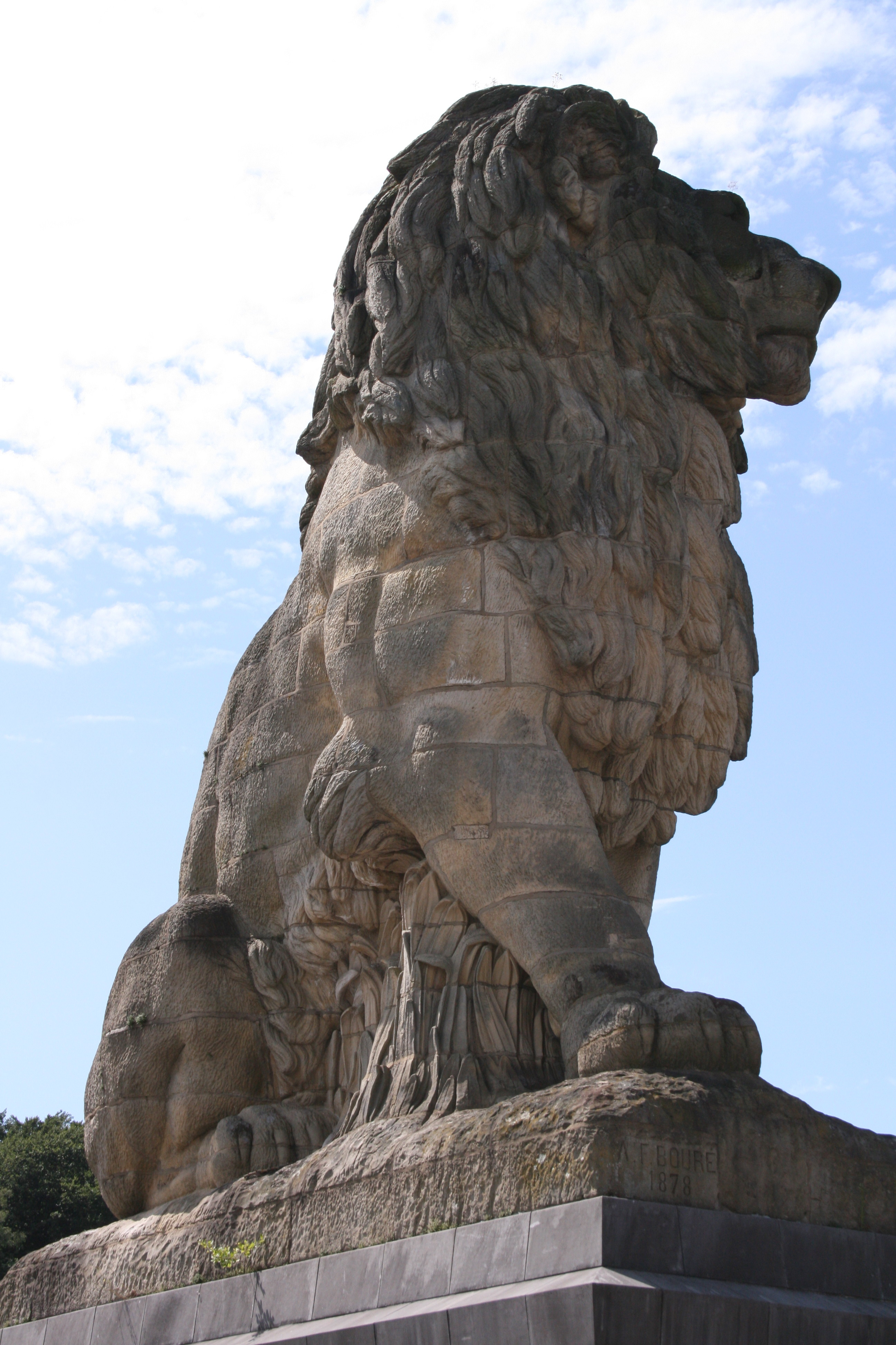 Barrage de la Gileppe, commune de Jalhay, province de Liège (Belgique). Détail: le lion